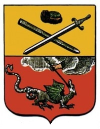 Герб Егорьевска, Рязанское наместничество